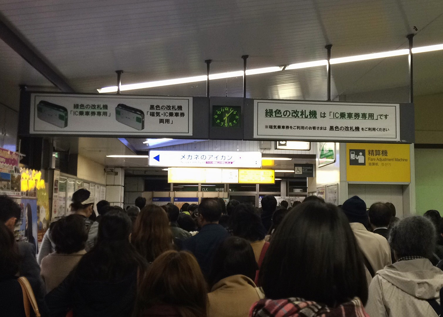 鎌取駅の改札渋滞